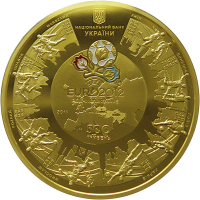 Золота монета Євро 2012 аверс